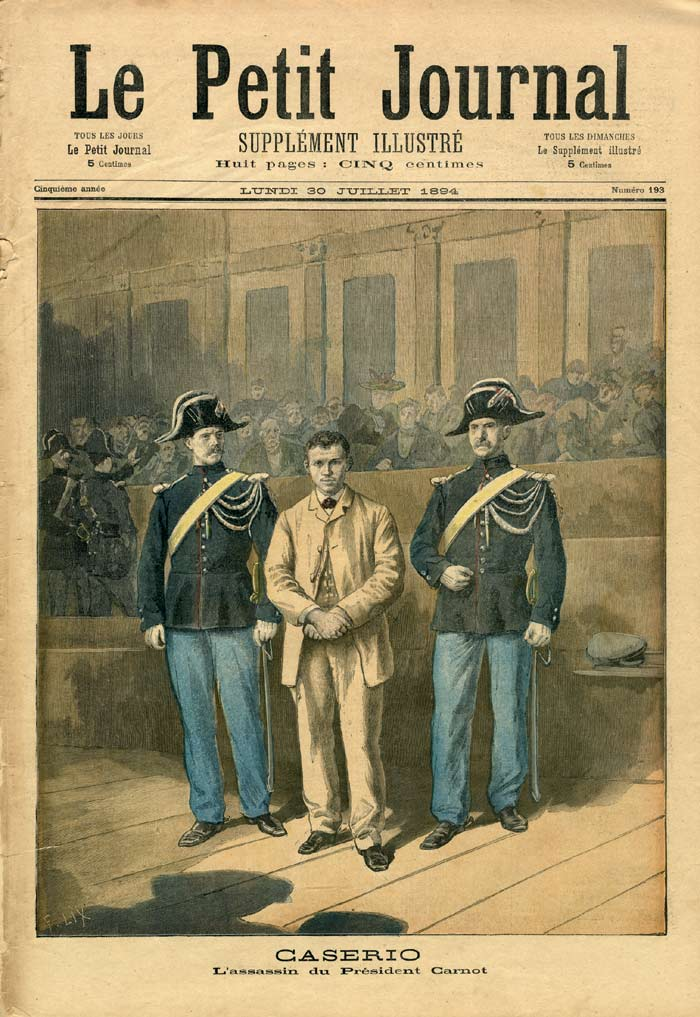 Capa do jornal Le Petit Journal da segunda, 20 de julho de 1894.